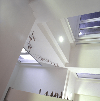 Bronzefiguren "Wandläufer" des Künstlers Lutz Bernsau als Leit- und Orientierungssystem im Rathaus Herscheid, Ansicht Treppenhaus